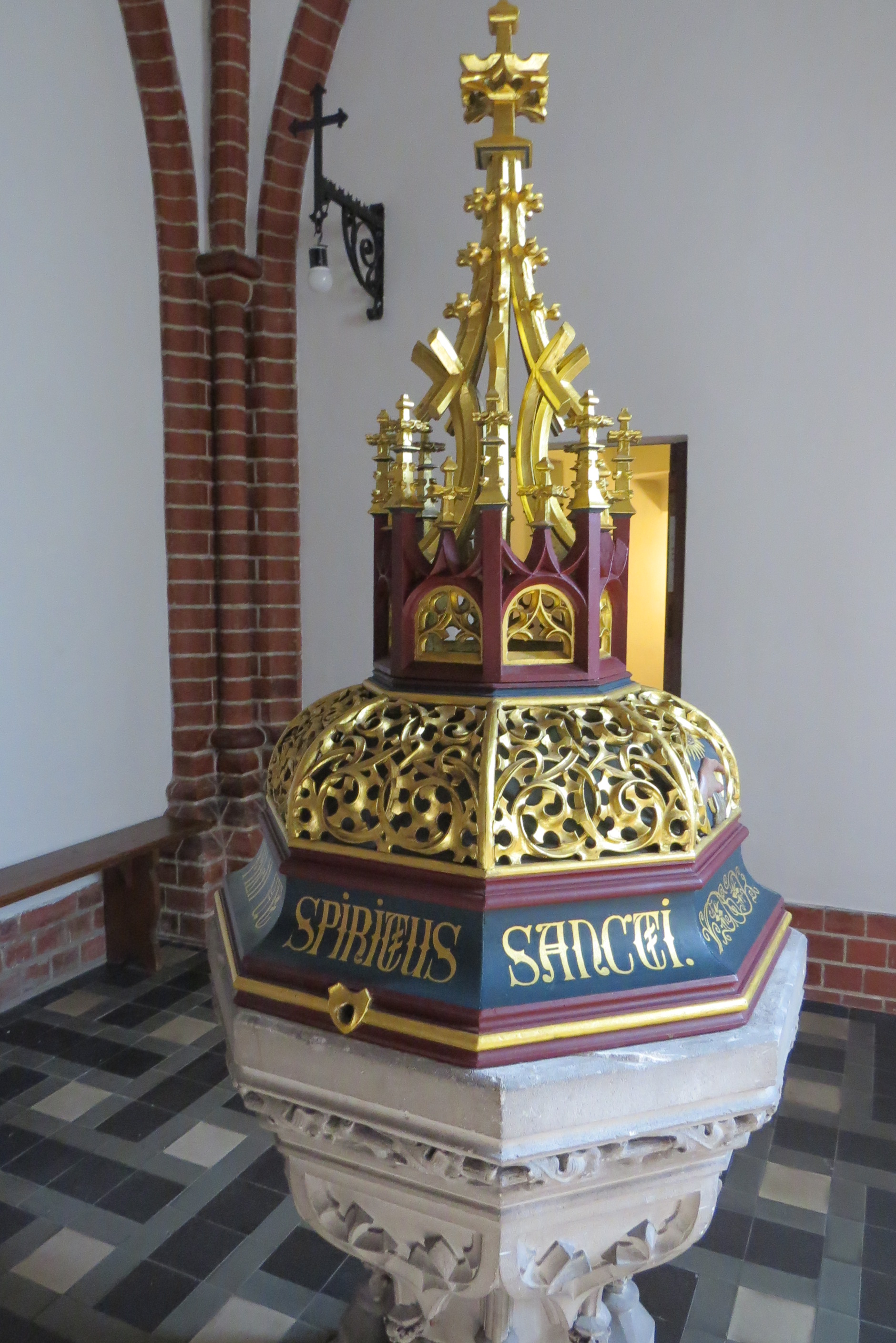 Kirche St. Georg, Berlin-Pankow, Deckel des Taufbeckens